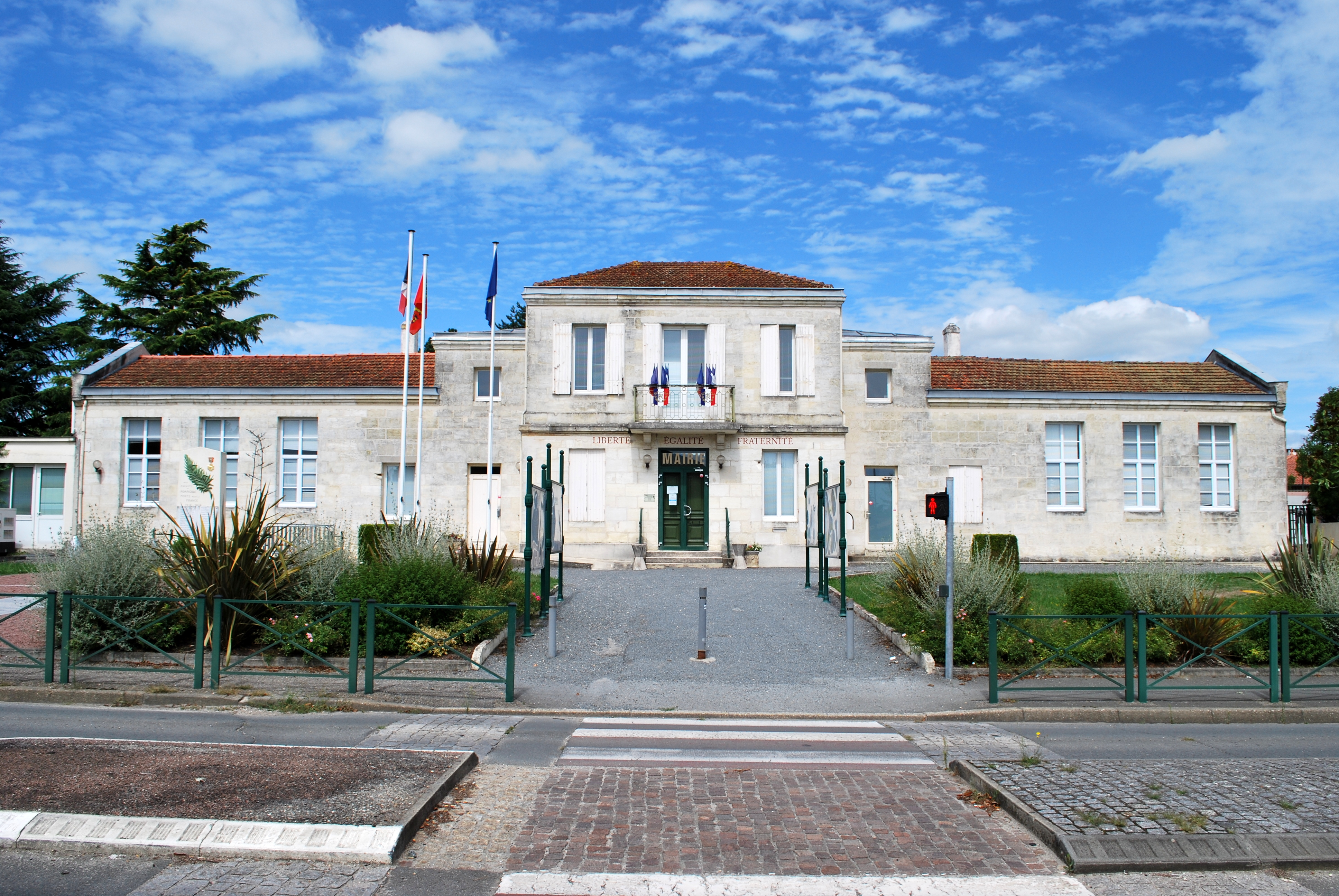 Mairie de Pompignac (Gironde, France).